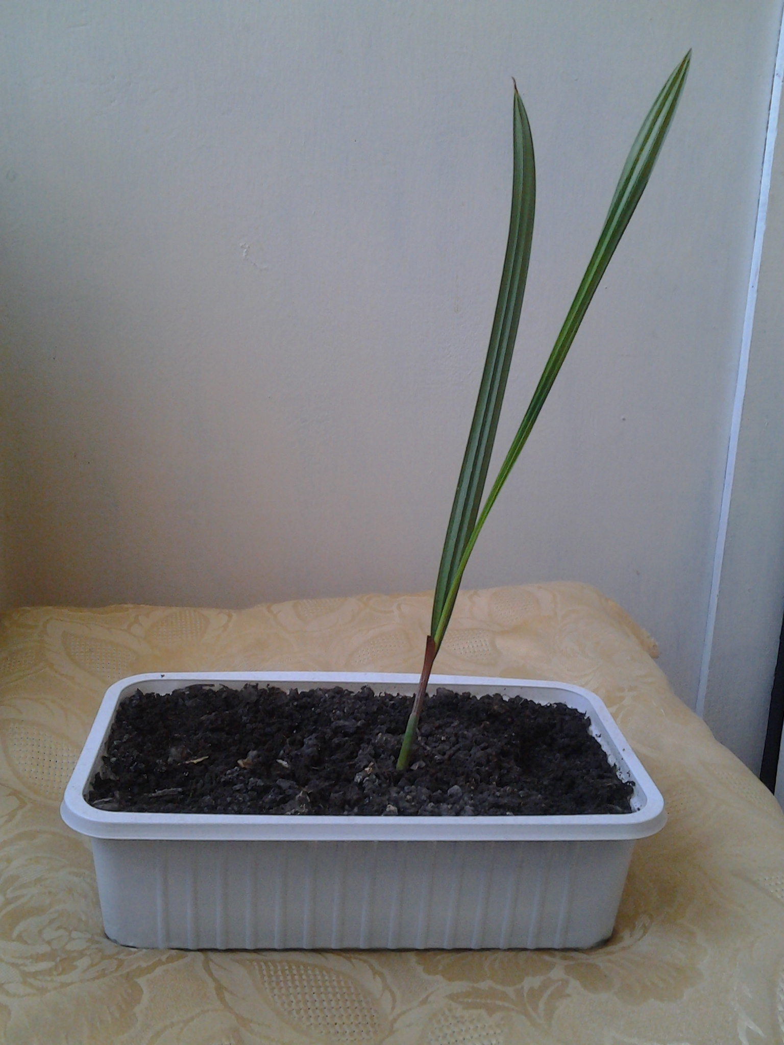 Phoenix dactylifera